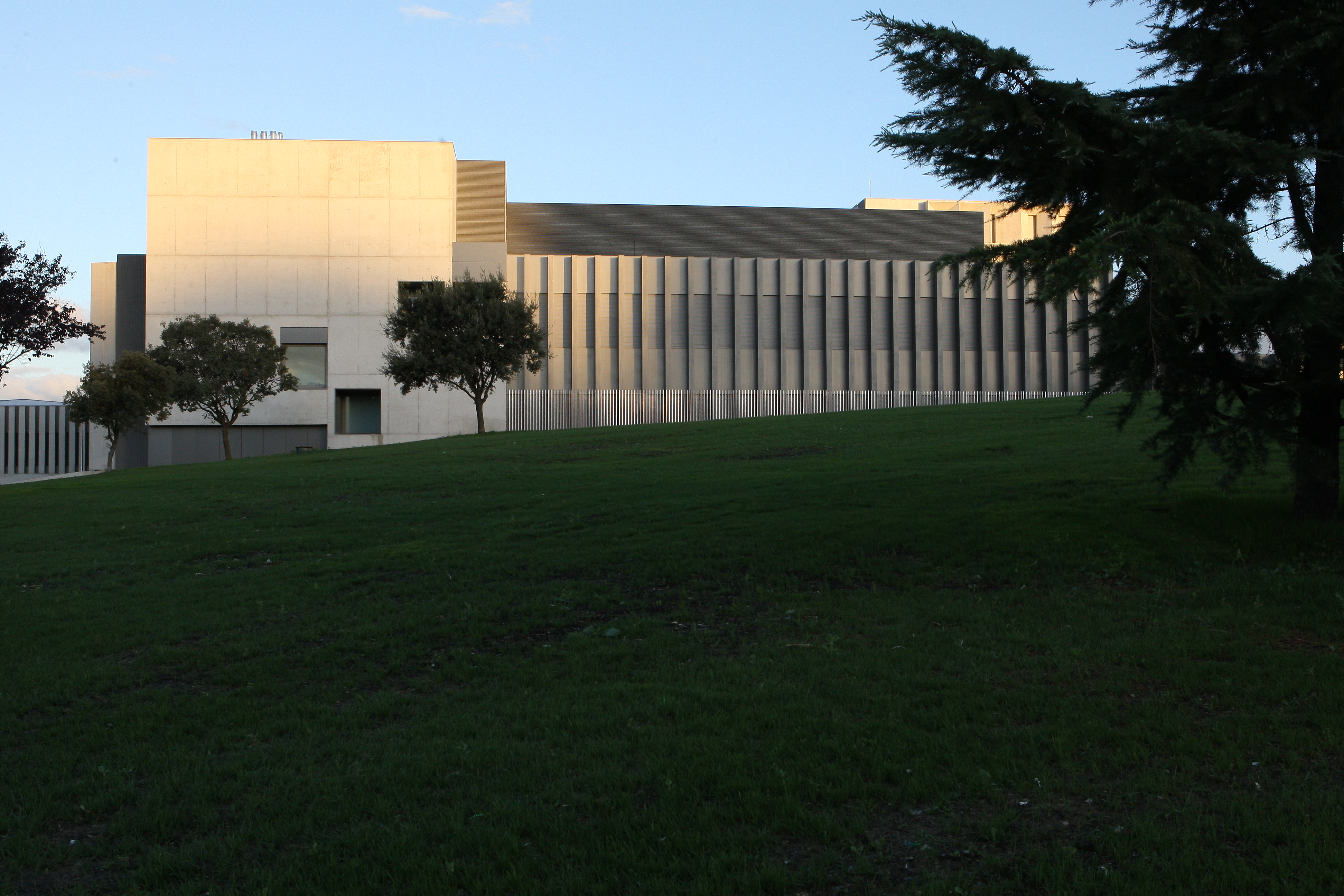 Exterior del edificio Amigos de la Universidad de Navarra